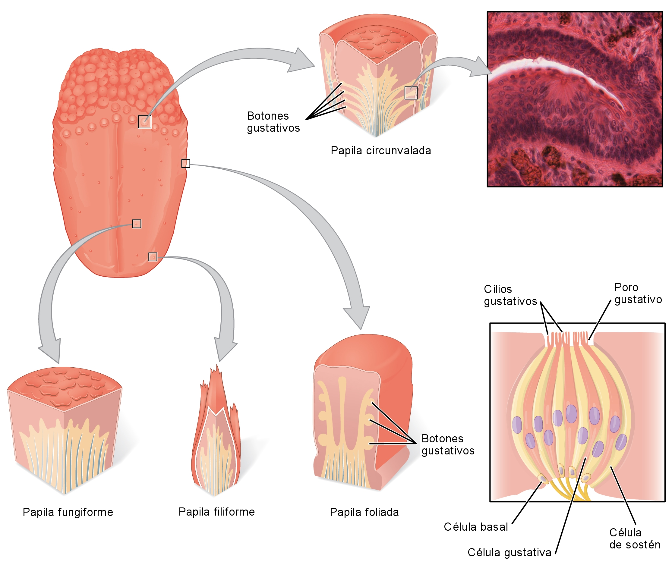 Representación de la lengua y los diferentes tipos de papilas gustativas.